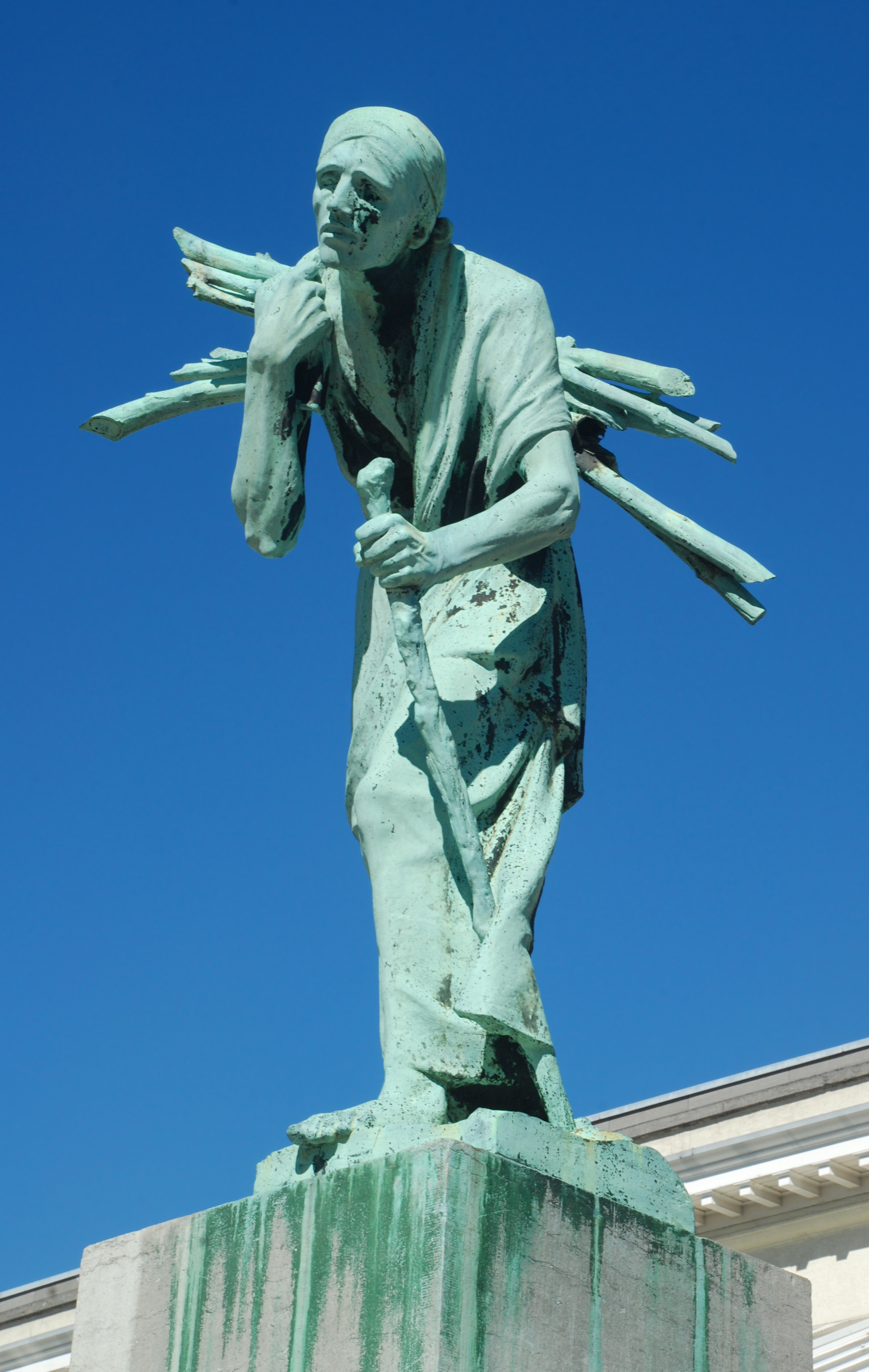 Belgique - Bruxelles - Jardin botanique de Bruxelles - L'Hiver ou La Vieille Bûcheronne de Pierre Braecke This photo of immovable heritage has been taken in the Brussels Capital Region